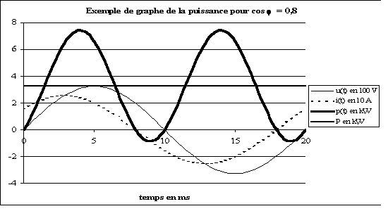 Dessin perso P.Loos